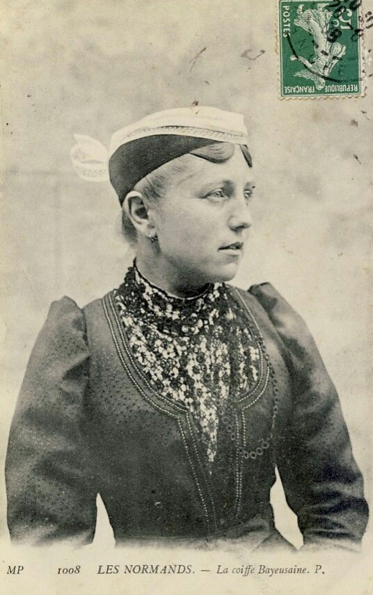 Bonnette de Bayeux. Carte postale ancienne.